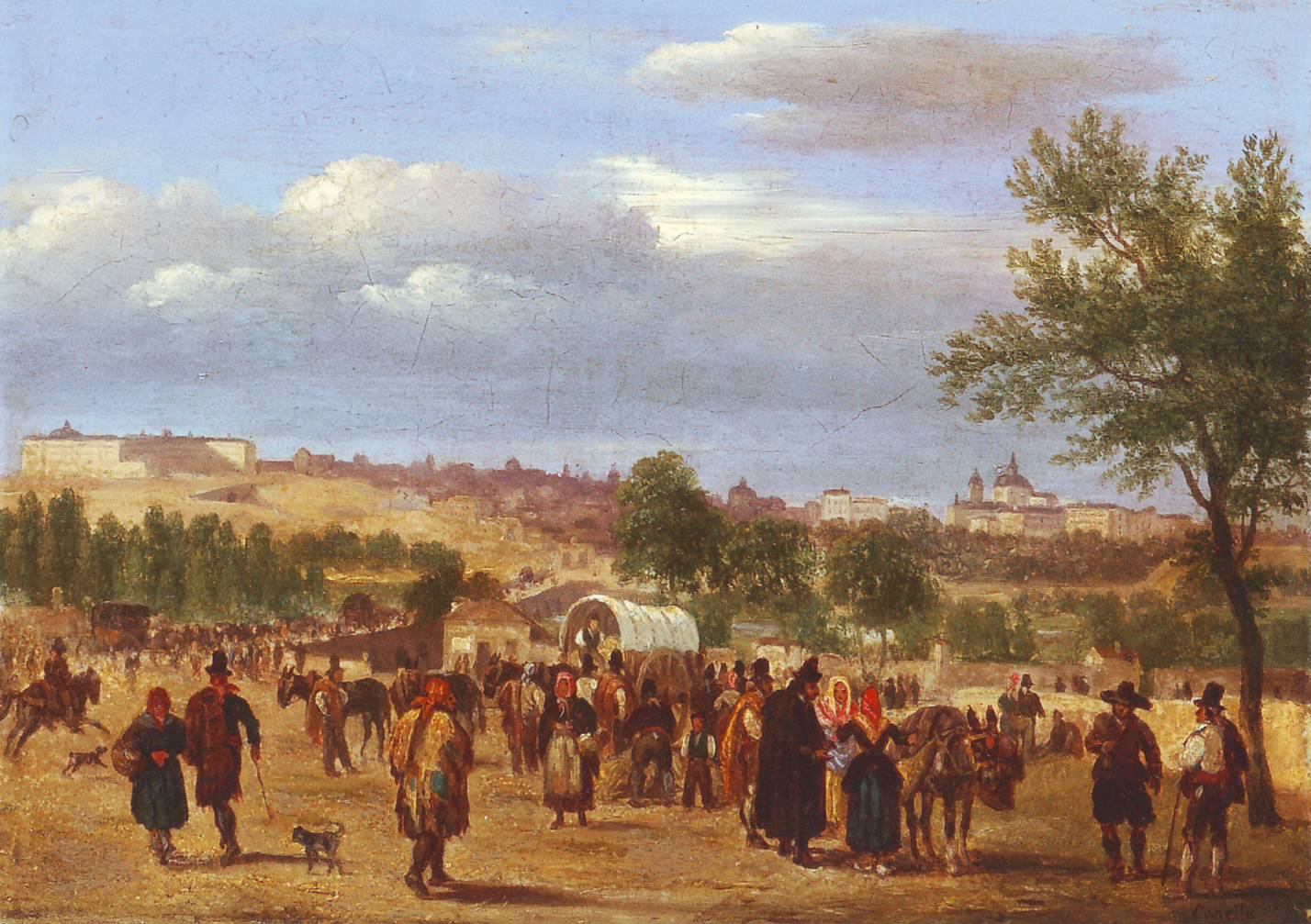 Vista de la Pradera de San Isidro en 1823, durante las fiestas y romería tradicionales. Al fondo, tras la linea de las arboledas del río Manzanares, se distinguen el Palacio Real -a la izquierda de la imagen- y las cúpulas de la Iglesia de San Francisco el Grande.